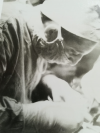 סטבורובסקי, שנת 1964, בית חולים איכילוב